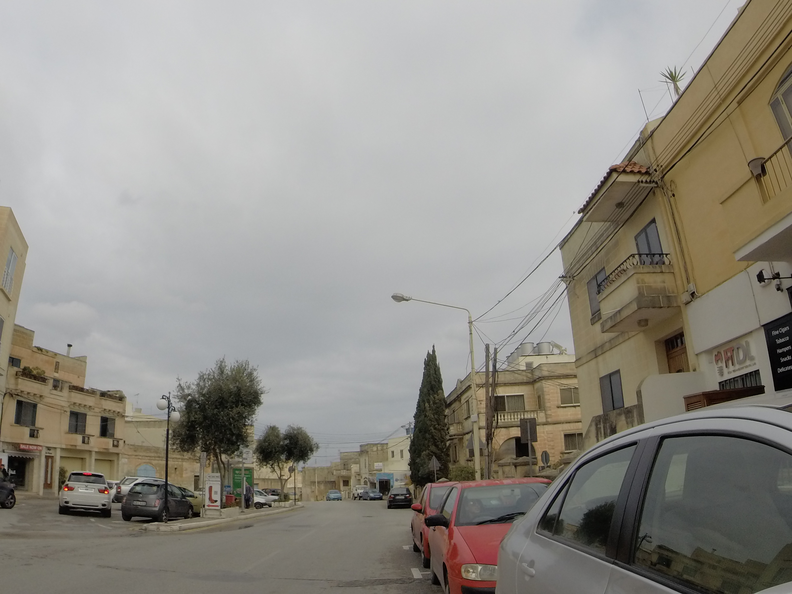 Swieqi, Malta